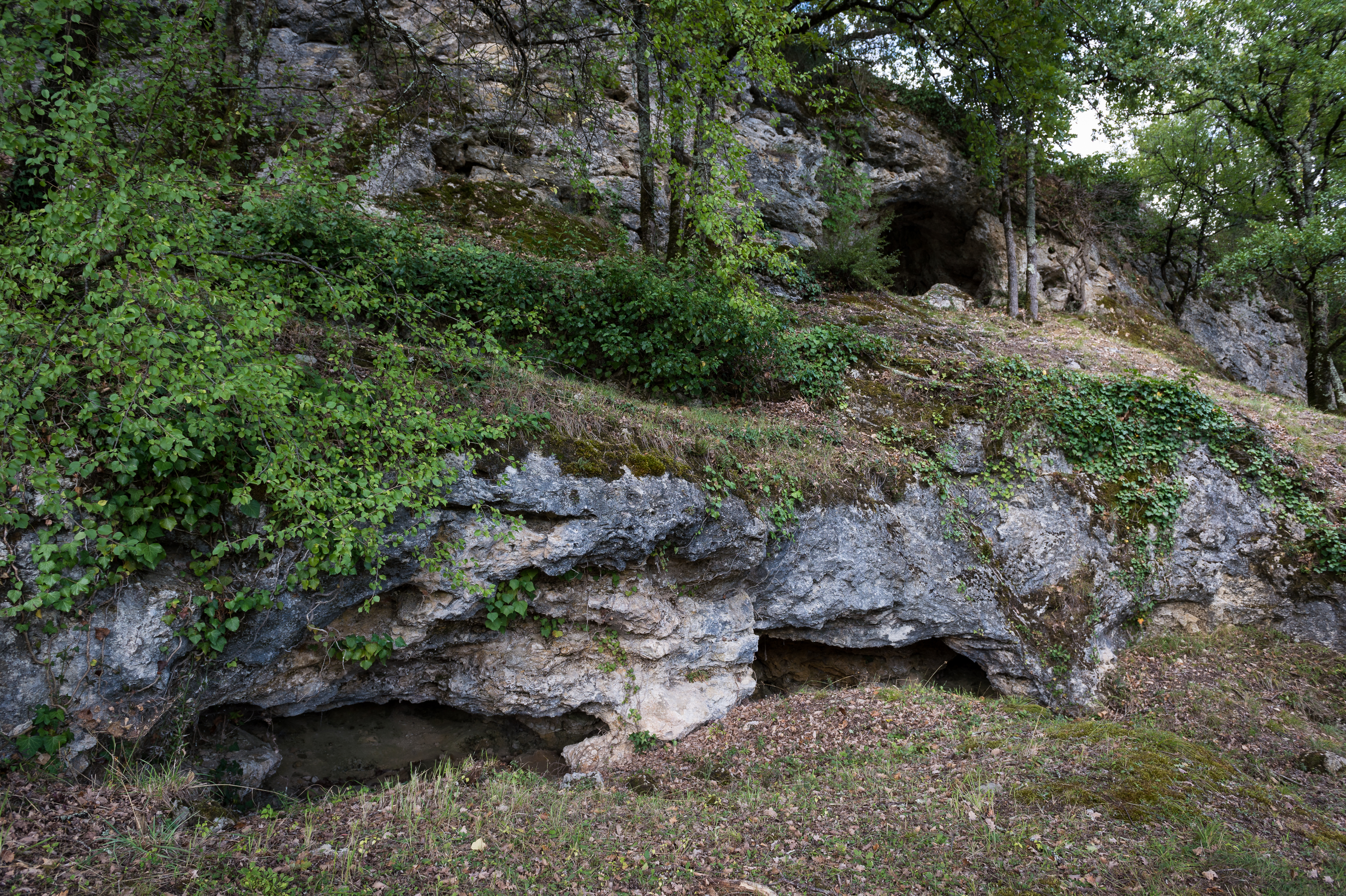 Die Fundstelle Badegoule am "Chemin de Badegoule" bei Le Lardin-Saint-Lazare in Frankreich.